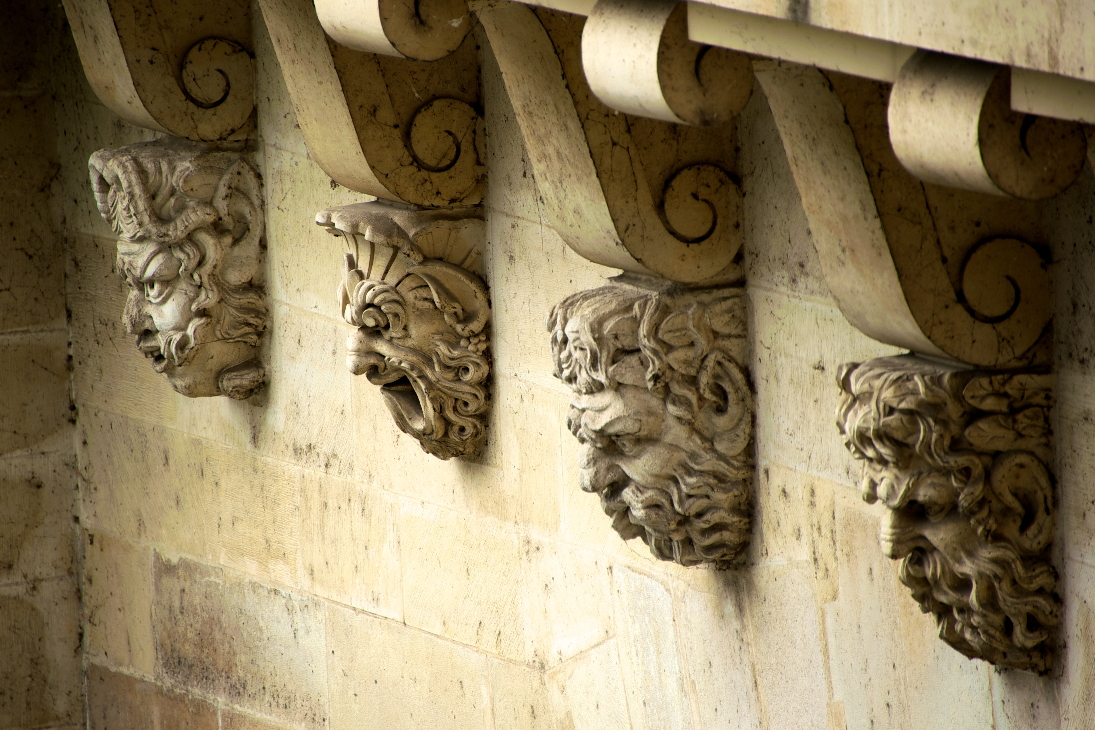 France 2011 - 102